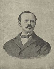 איזידור זינגר